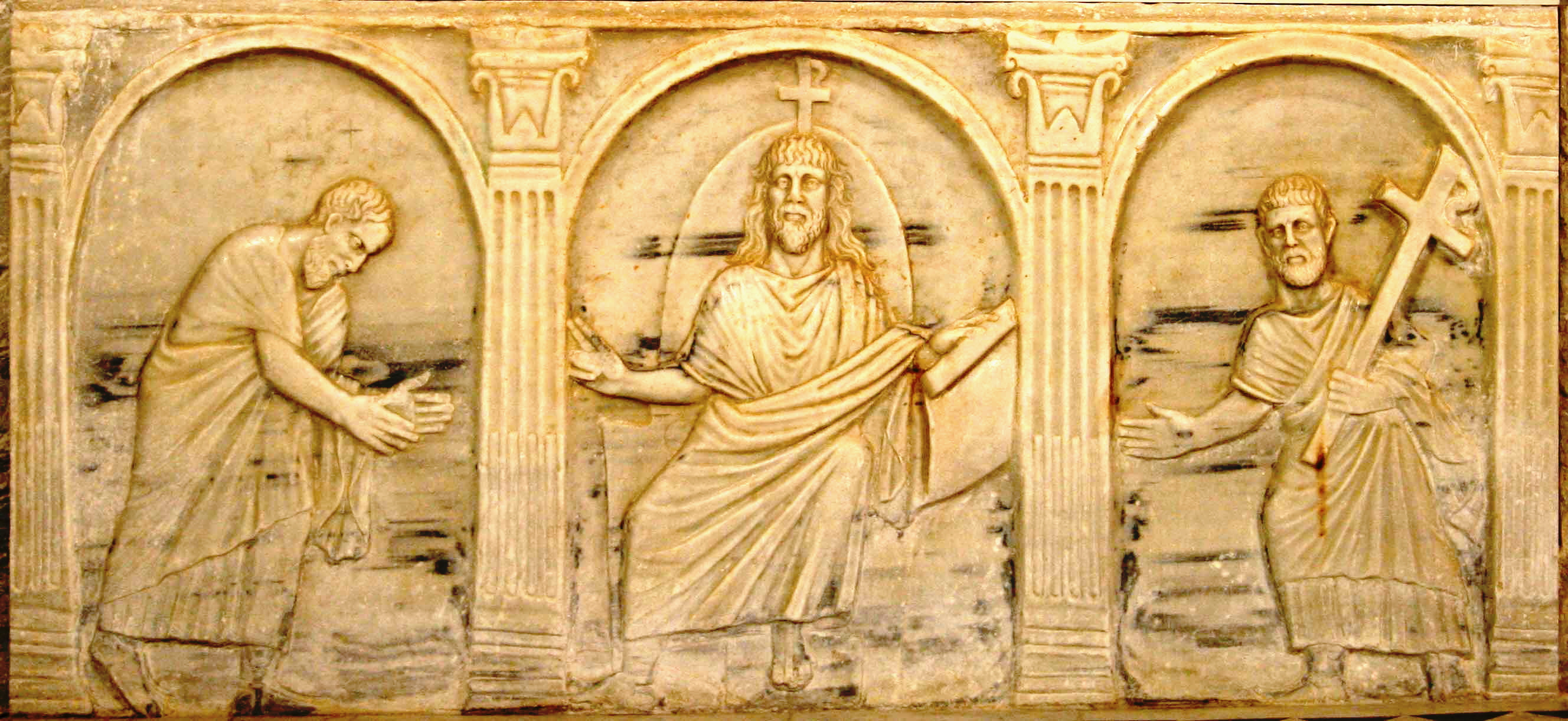 Arles (Bouches-du-Rhône,France), dans l'ex-cathédrale Saint-Trophime, sarcophage paléochrétien, en marbre de Carrare, de Geminius, trésorier des cinq provinces de Gaule (début Ve siècle).